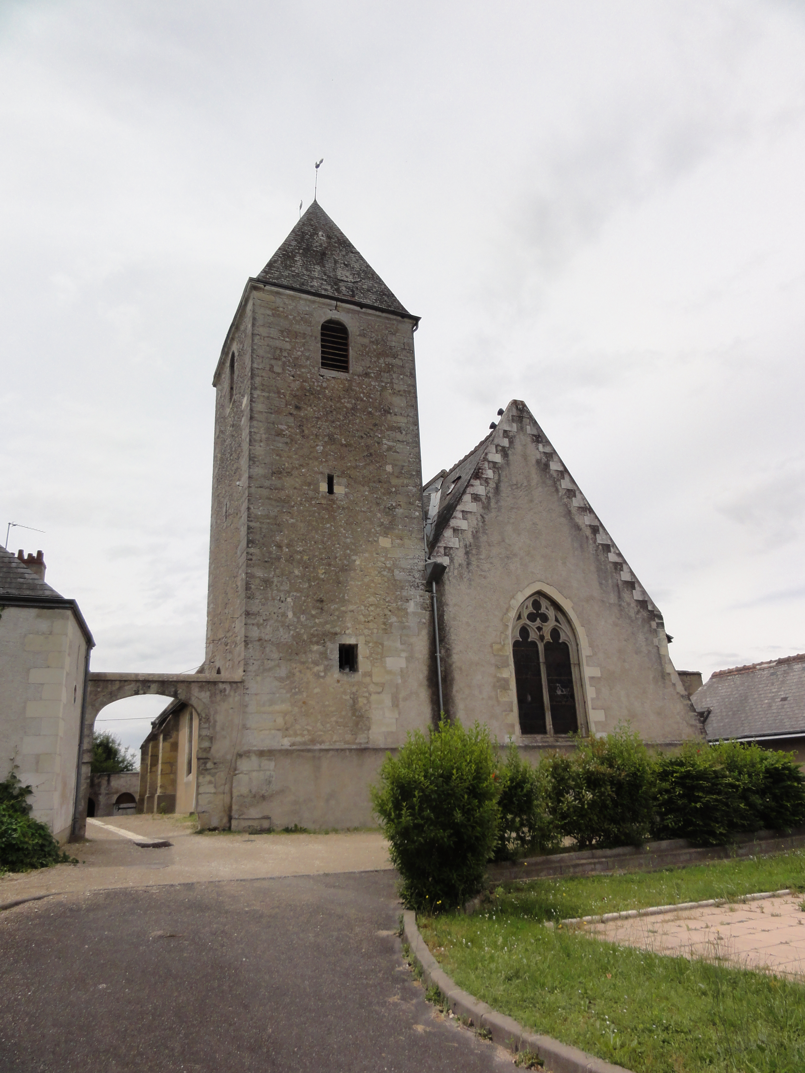 Chargé (Indre-et-Loire) Église